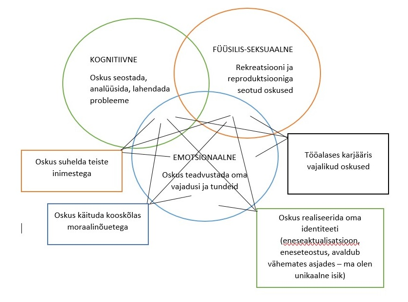 20.sajandi teises pooles G.Gazda poolt kirjeldatud inimese olemise alad ja selleks vajalikud oskused